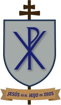 Escudo episcopal de Mons. Eduardo Vicente Mirás